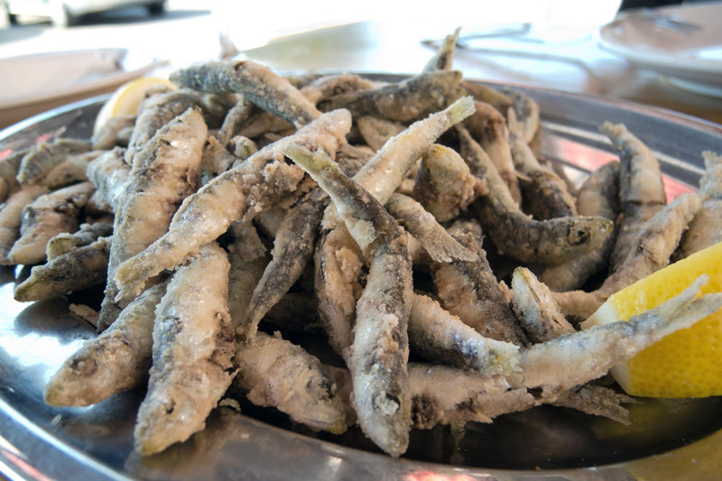 Prženi gavuni